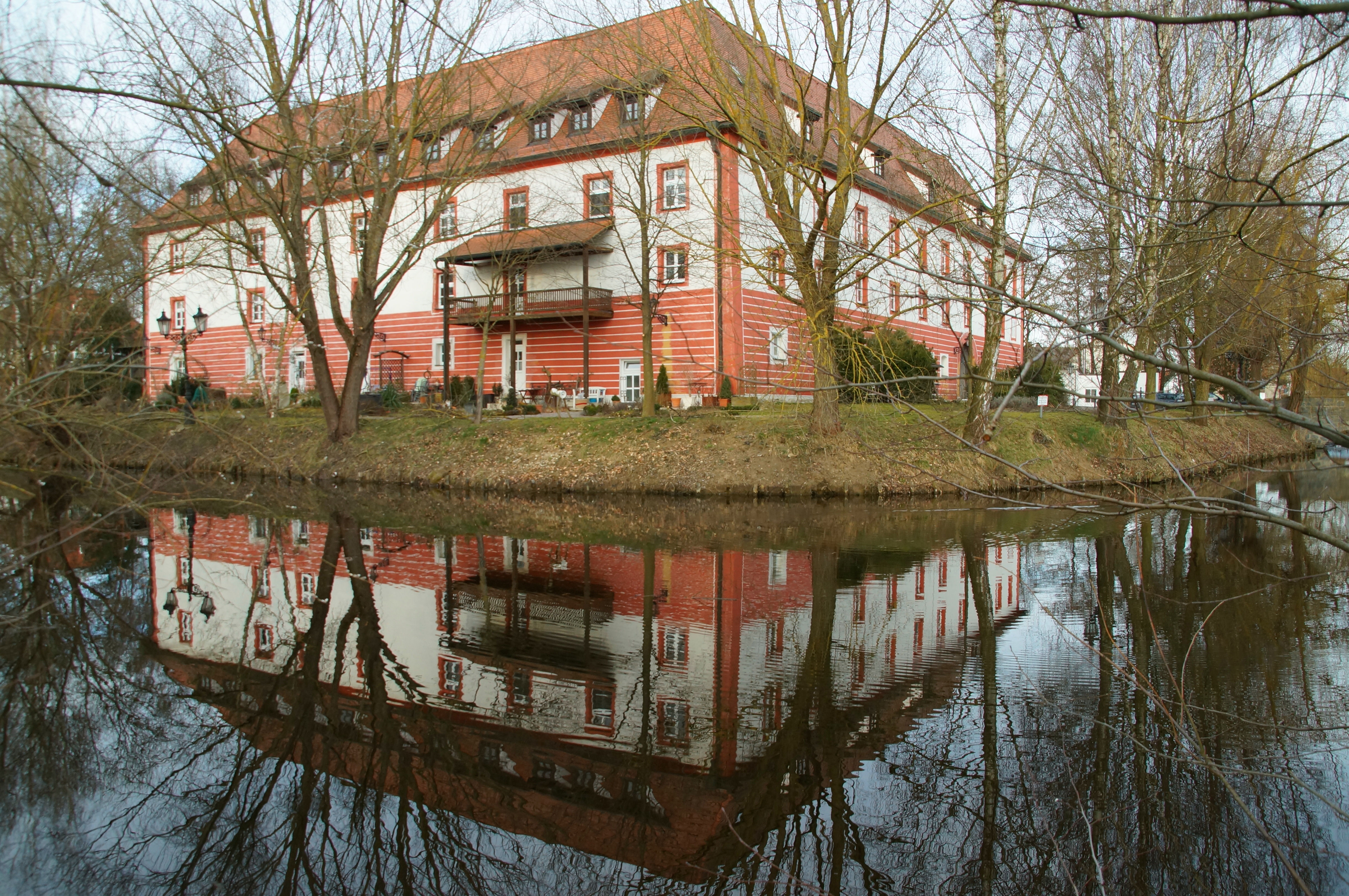 Wasserschloss Gebelkofen in Gebelkofen, Obertraubling, Bayern This is a photograph of an architectural monument.